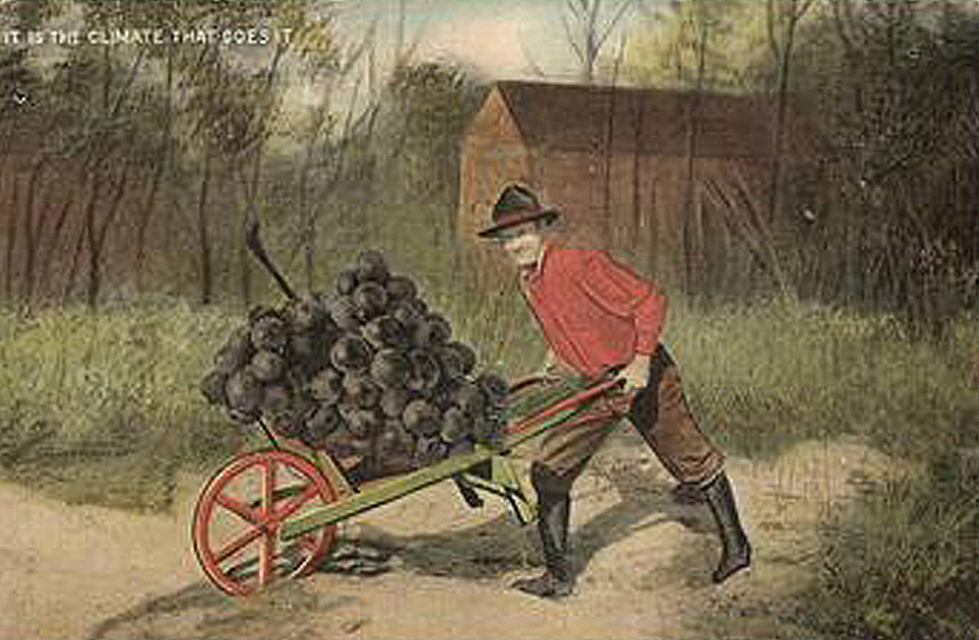 Canada Vendange inespérée